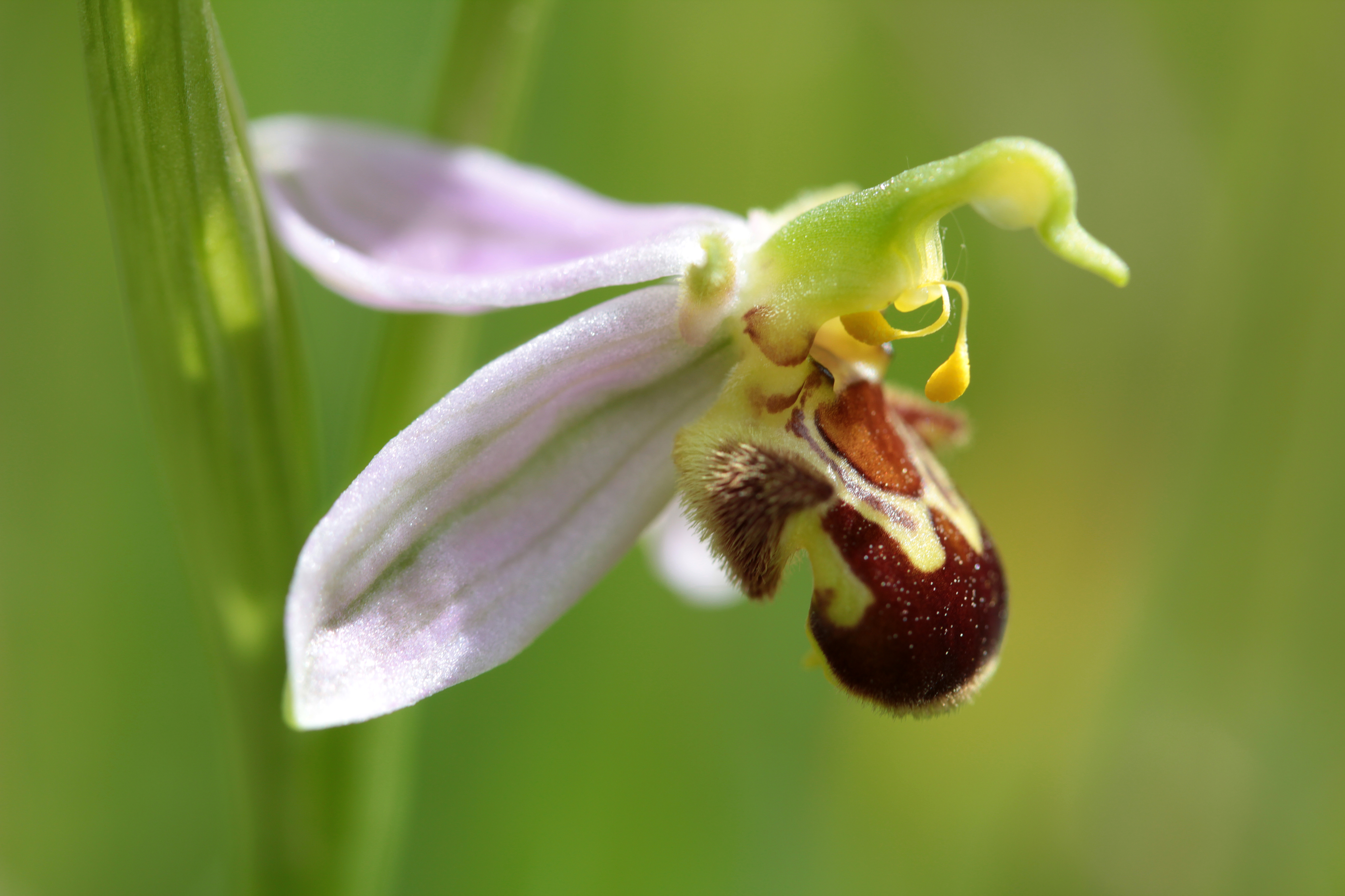 Bienen-Ragwurz aus Jugenheim in Rheinhessen